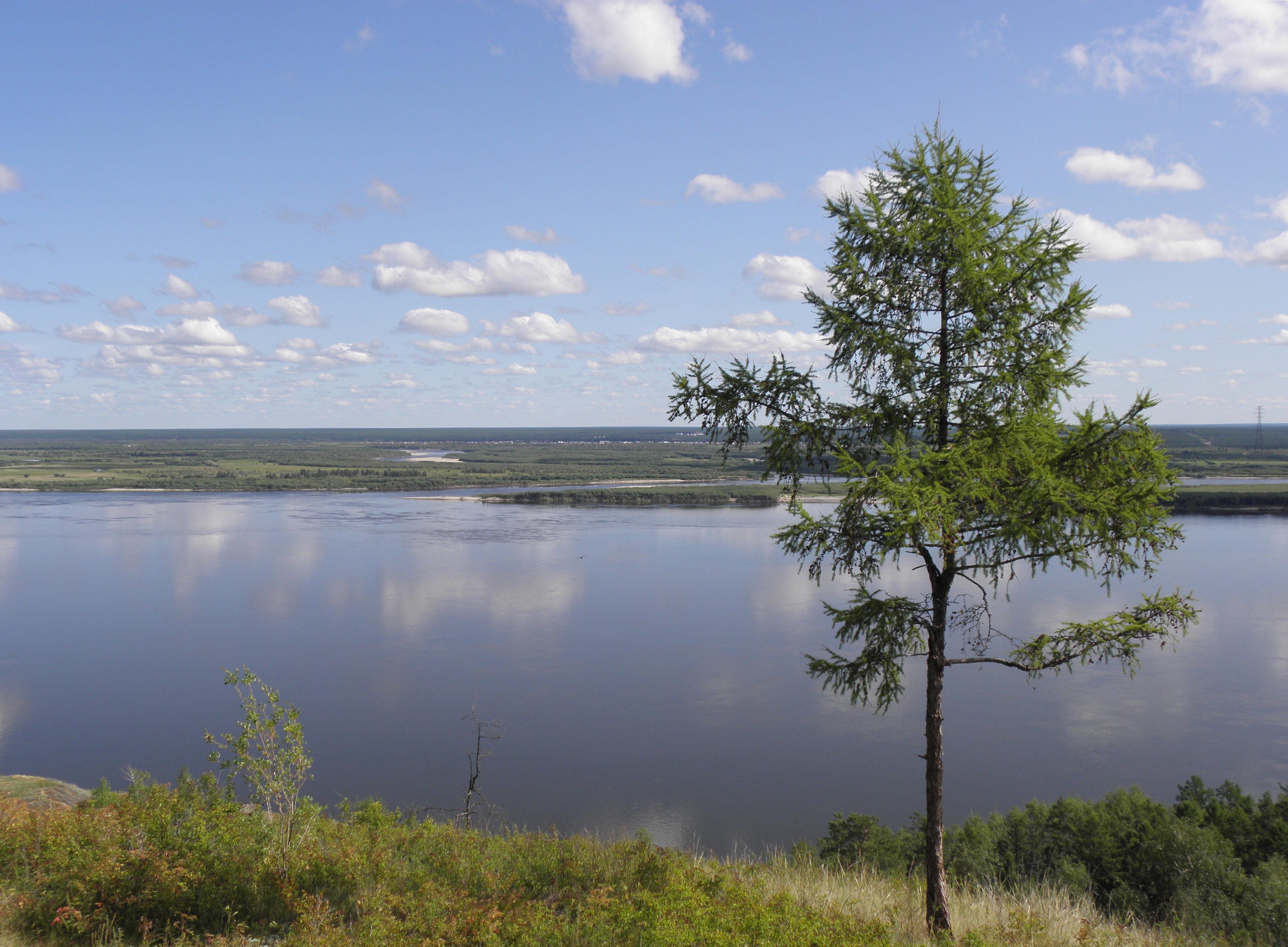 Река Лена в районе Табагинского мыса